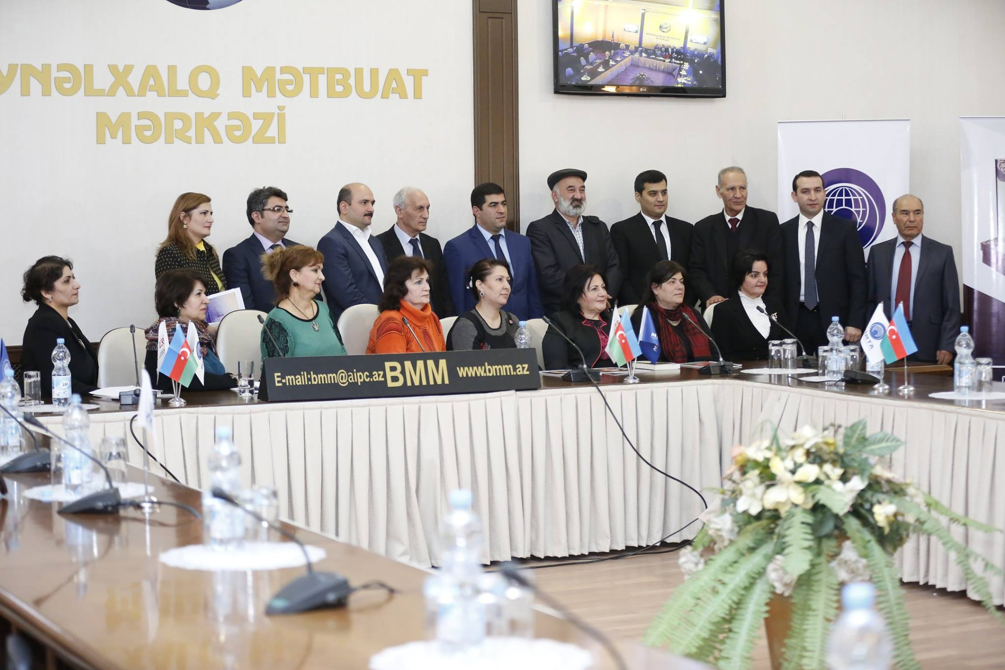 “Azərbaycan Elm və İrfan sərdarları” kitabının geniş təqdimat mərasimi